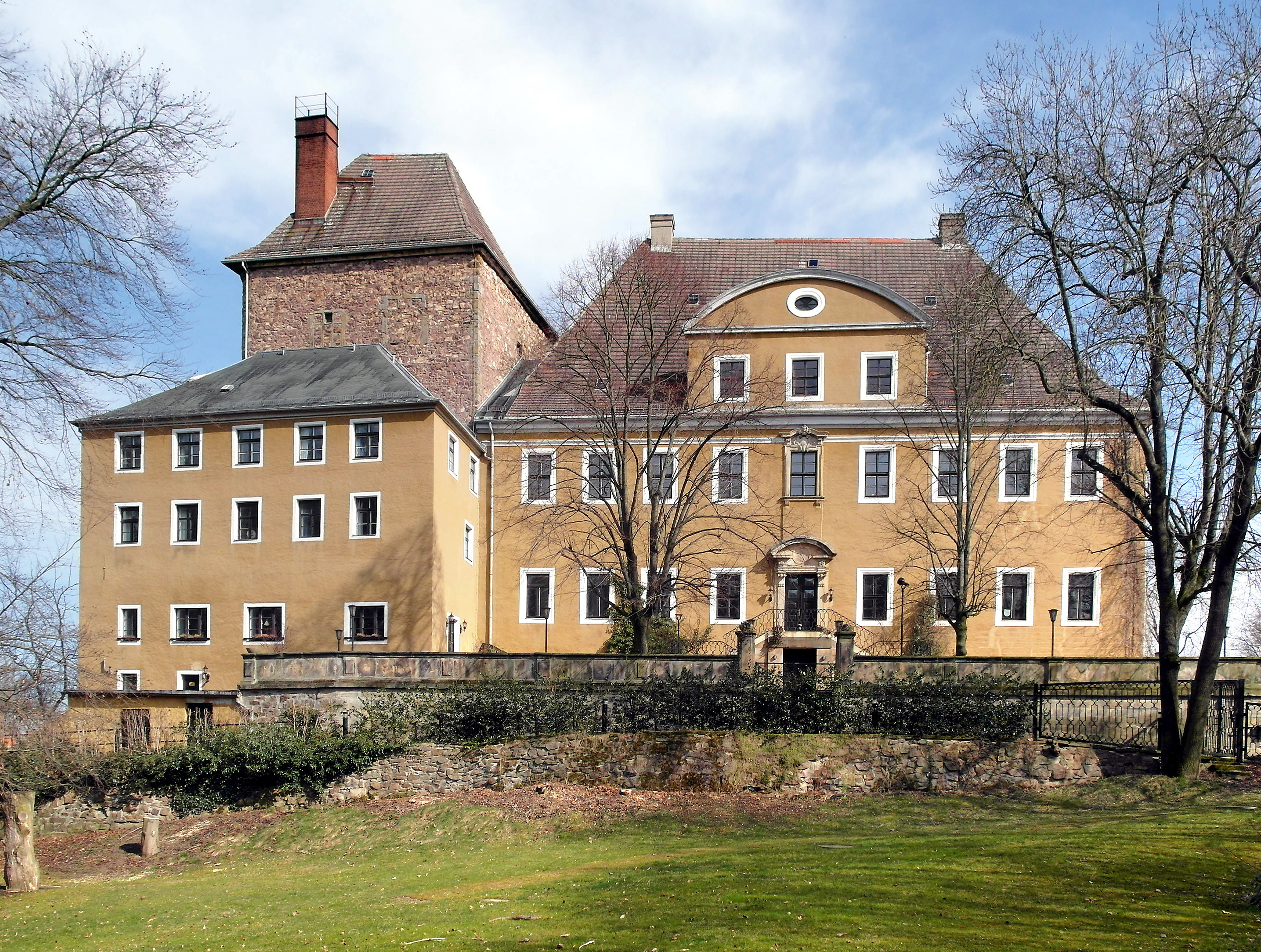 17.03.2015 09629 Bieberstein (Gemeinde Reinsberg): Schloß Bieberstein von Süden. Lindenallee / Am Rittergut [SAM8948.JPG]20150317515DR.JPG(c)Blobelt